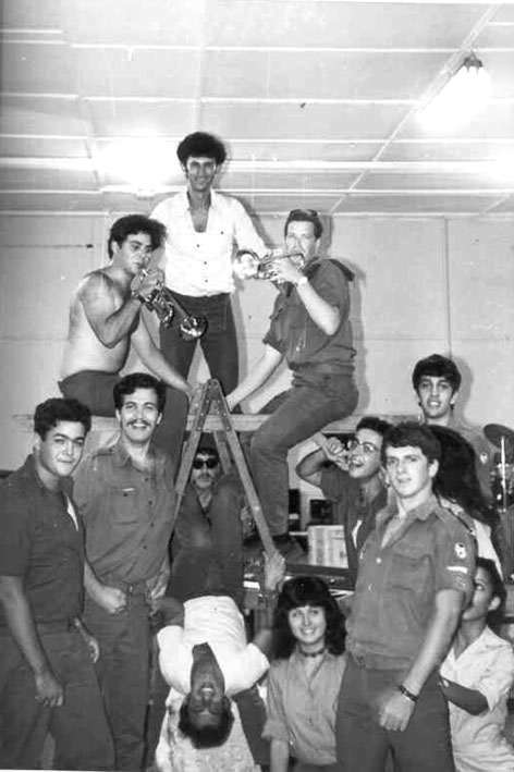 להקת פקוד דרום 1973 בזמן חזרות. למעלה:אורי קירב, המנהל המוזיקלי. משני צידיו אלי שני-שאוואט (בלי חולצה) ויורם פרידמן (טרומבוניסט). כורעת, למטה: חנה לסלאו. לפניה רמי רודן ואחריו דפנה הלל בן דוד. מאחוריהם עמי קנר. עומד (עם שפם) שמעון ברק ולידו יוסי פרי (חצוצרן). בין רגלי הסולם יונתן קפלן (מתופף) והפוך שולי (אורגניסט). עם המשקפיים עופר לבנברג(חצוצרה שנייה).